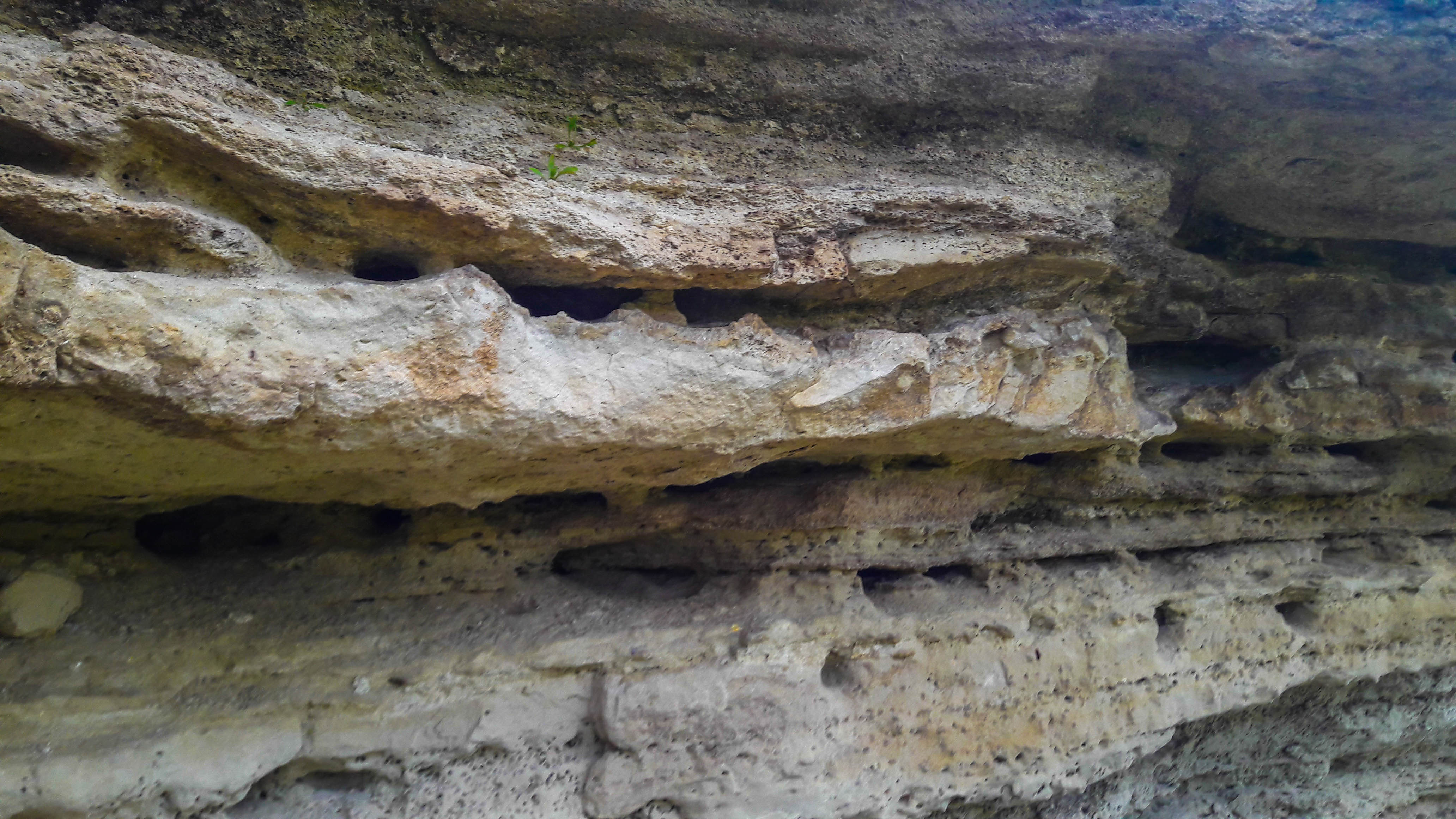 A-042